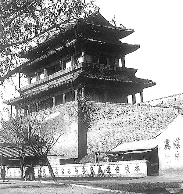 中文（中国大陆）: 北京阜成门城楼